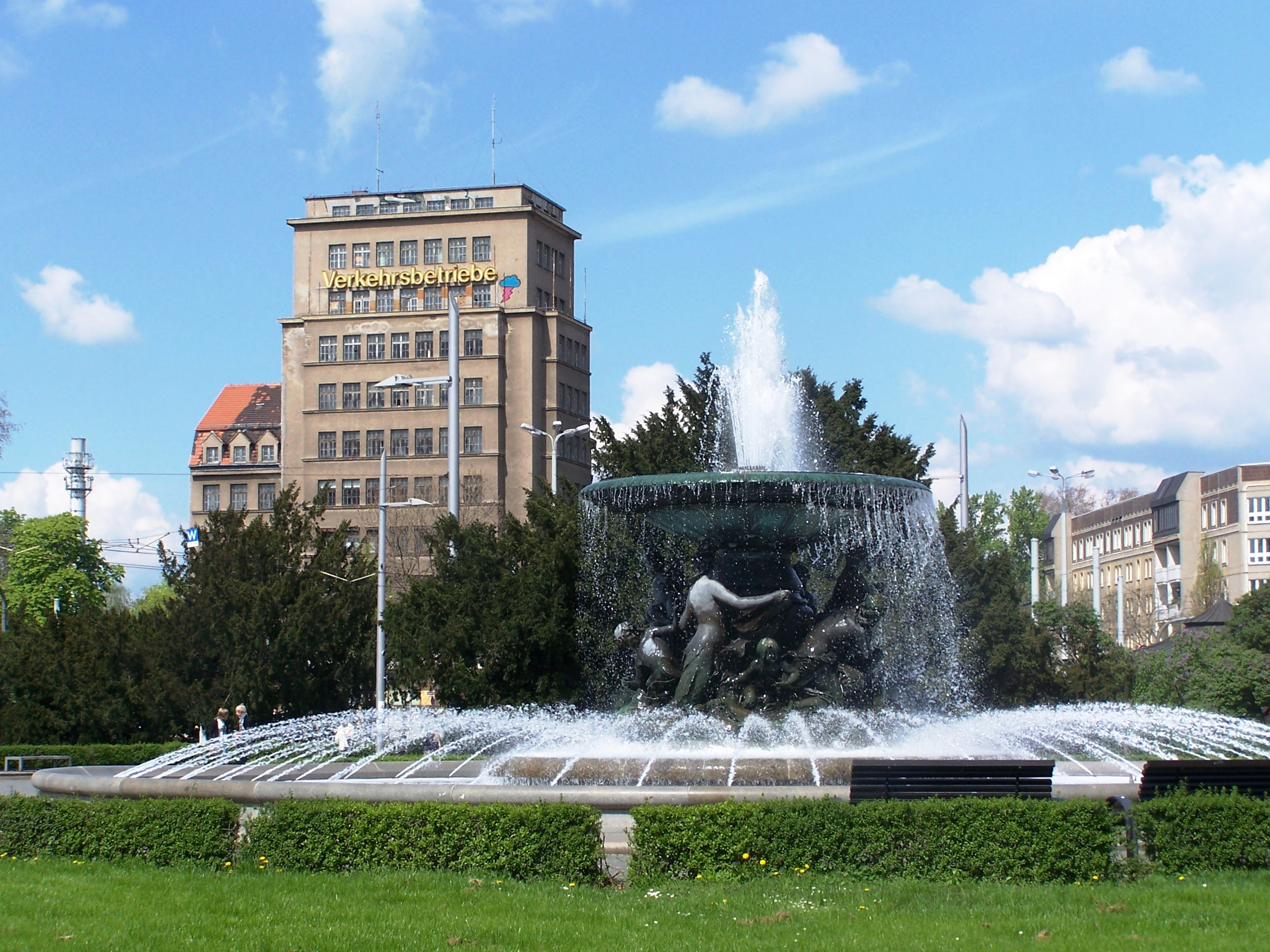 Brunnen „Stille Wasser“ von Robert Diez auf dem Albertplatz in Dresden